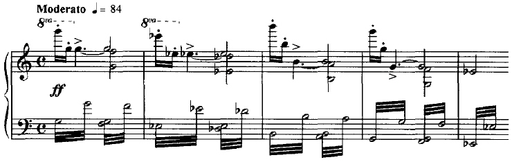 Глинка. Опера "Руслан и Людмила". Фрагмент I акта (клавир)